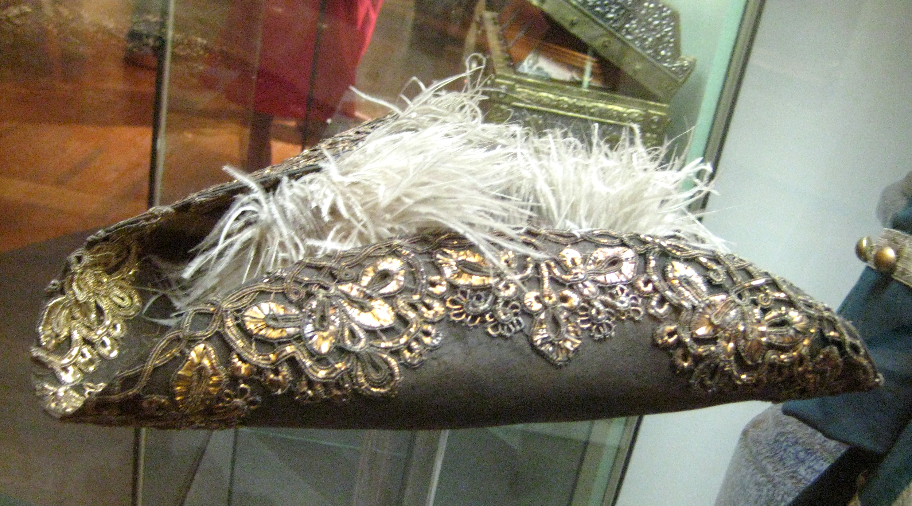 Шляпа императора Петра III. 1760-е. ГИМ